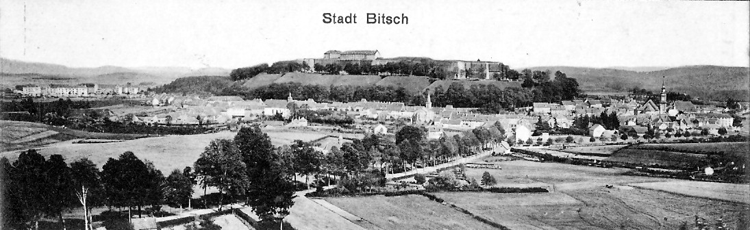 Blick auf Bitsch vor 1904